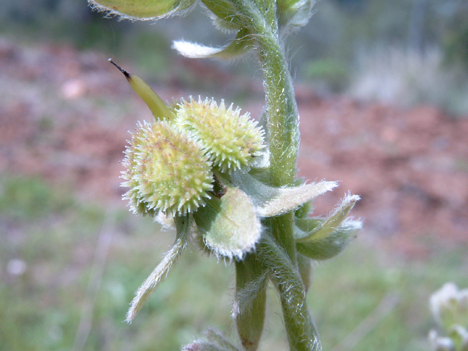 Name Cynoglossum creticum Familiy Boraginaceae Used in Article Cynoglossum creticum.